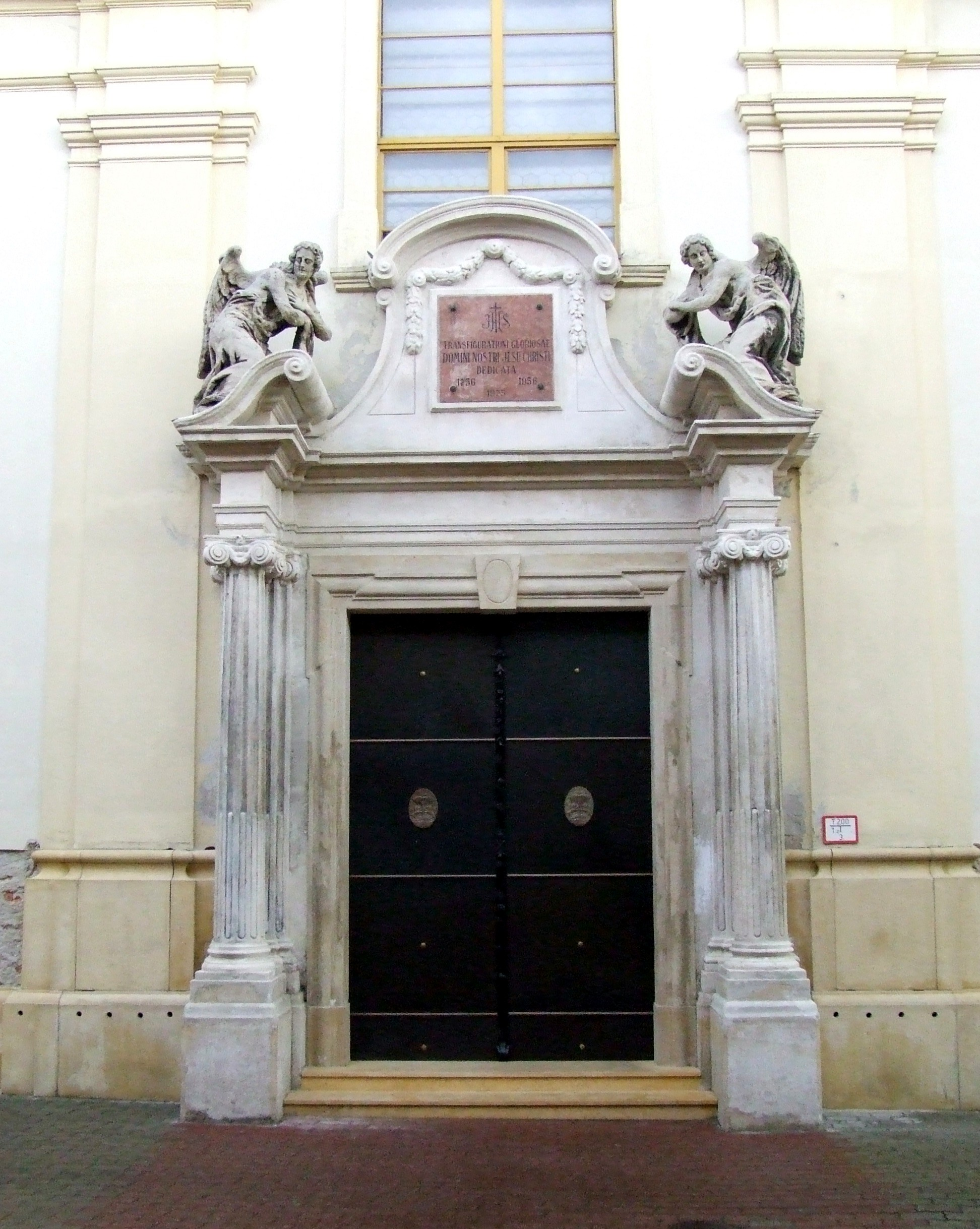 A pécsi Lyceum templom (egykori pálos templom) bejárata. A templom 1741 és 1756 között épült Vépi Máté pálos szerzetes tervei szerint